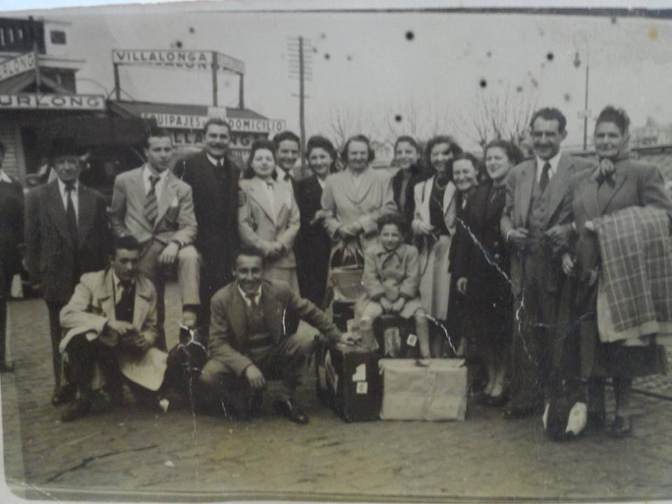 Llegada y recibimiento de Nélida Fullone en el Puerto de Buenos Aires, después de su participación en las Olimpíadas de Londres 1948, junto a su familia.